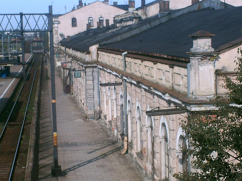 Bahnhof Aleksandrow-Kujawski